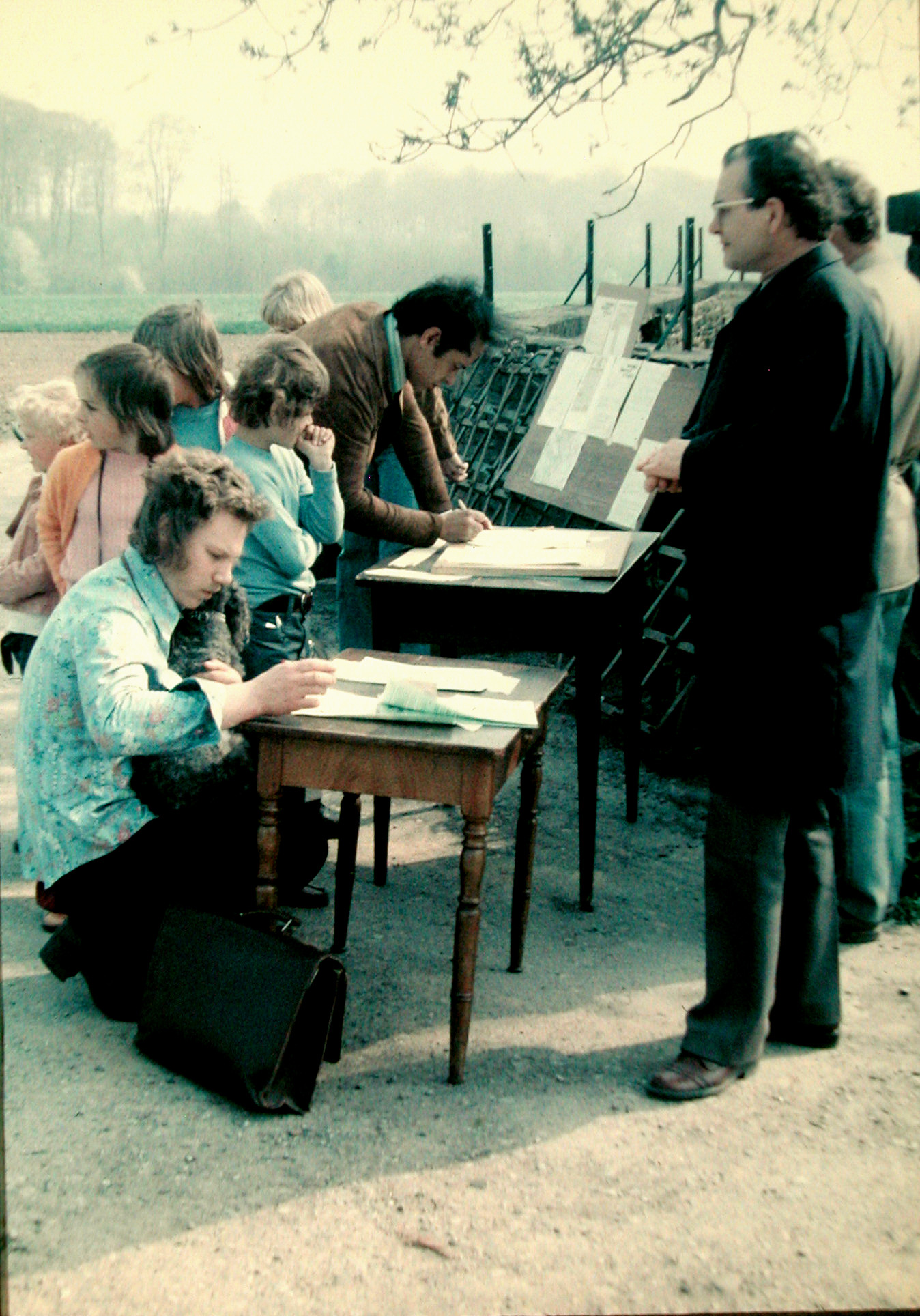 Unterschriftensammlung beim Bauer Kocks